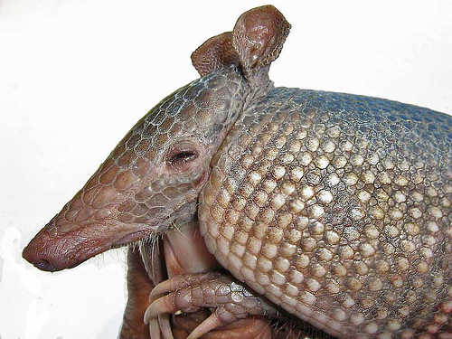 cachicamo, tatú, armadillo